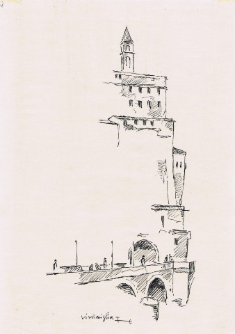 Ventimiglia